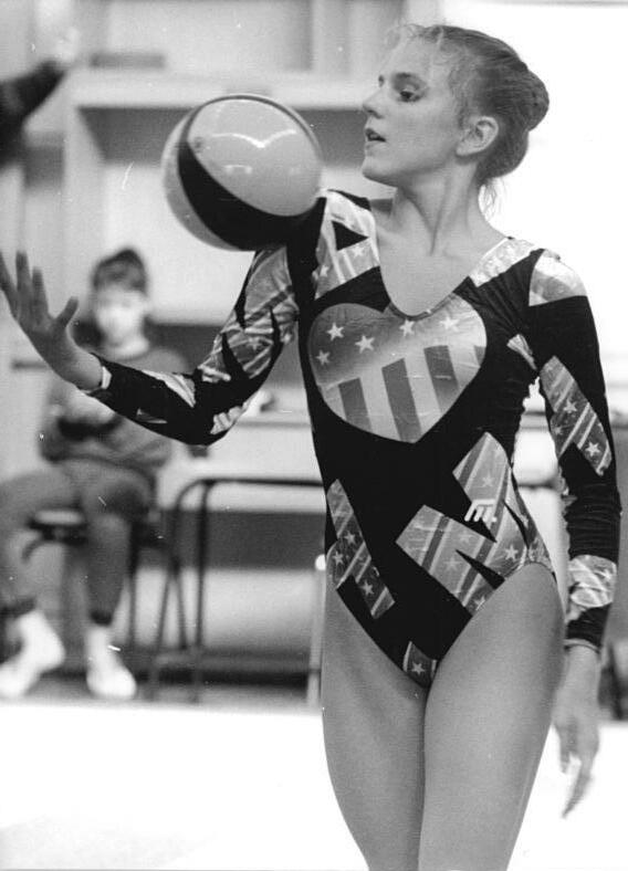 DDR-Meisterschaft, Silke Neumann ADN-Friedrich Gahlbeck 16.9.90 Halle: Gymnastik-Meisterschaften-Die 15jährige Hallenserin Silke Neumann stellte sich bei den letzten DDR-Meisterschaften in der Rythmischen Sportgymnastik in Halle-Neustadt in bestechender Form vor. Sie errang in allen vier Einzelwettkämpfen den DDR-Meistertitel.